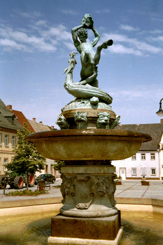 Centaurenbrunnen in Frohburg (Sachsen)